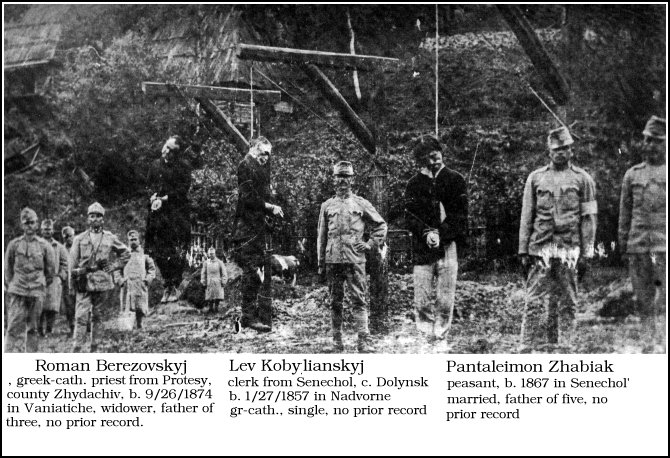 Жертвы Талергофа